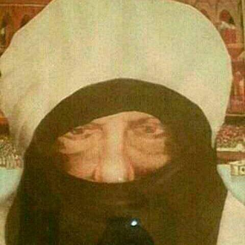 Photo de Cheikh Saad Bouh, saint soufi musulman de l'Afrique de l'ouest (khadriya)